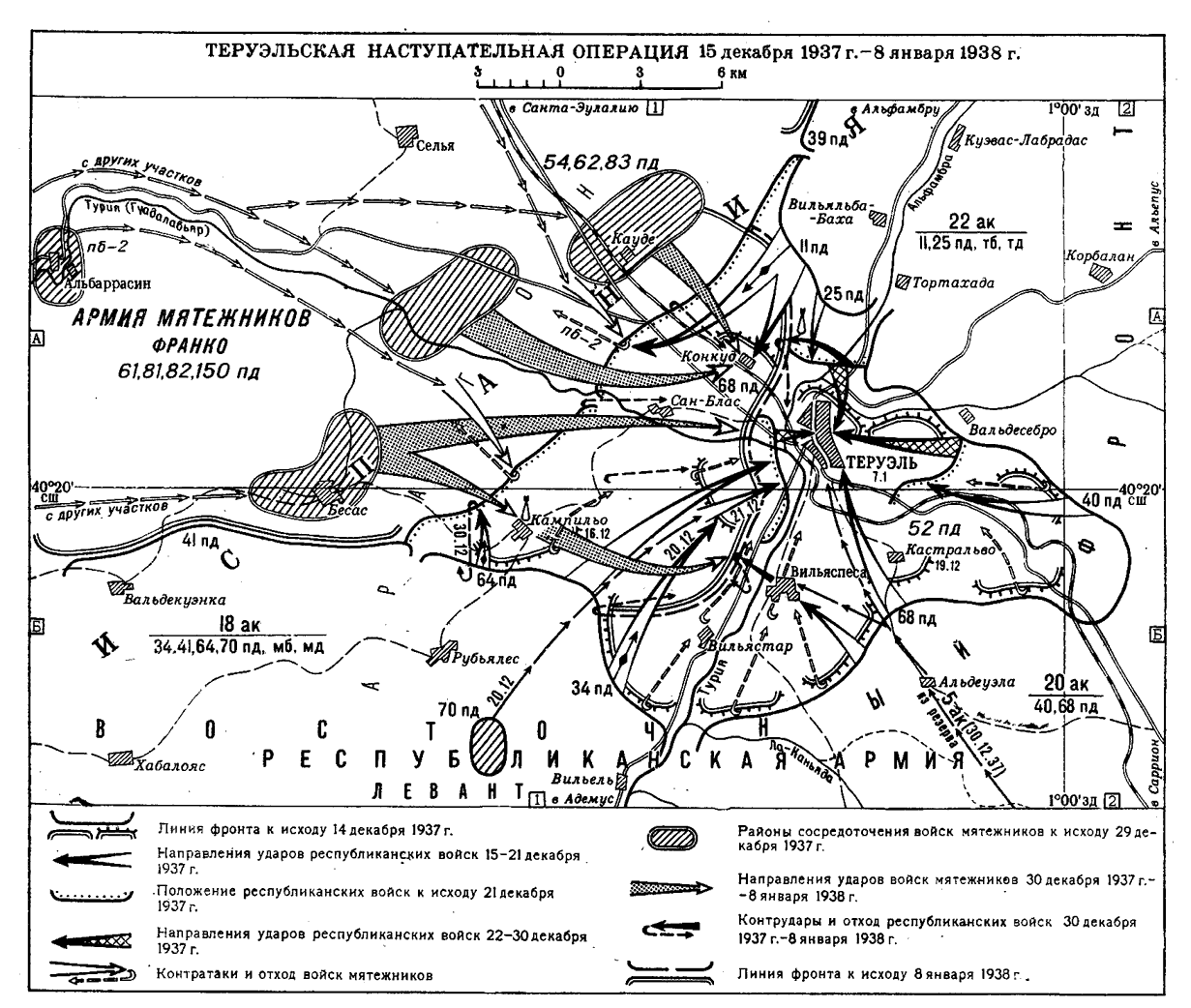 Карта битва за Теруэль